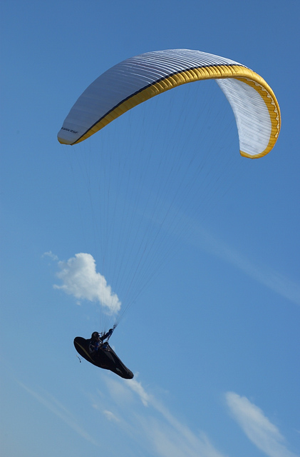 Парапланер над Сопот. Кръг от PWC 2005; © 2005 Асен Баръмов (